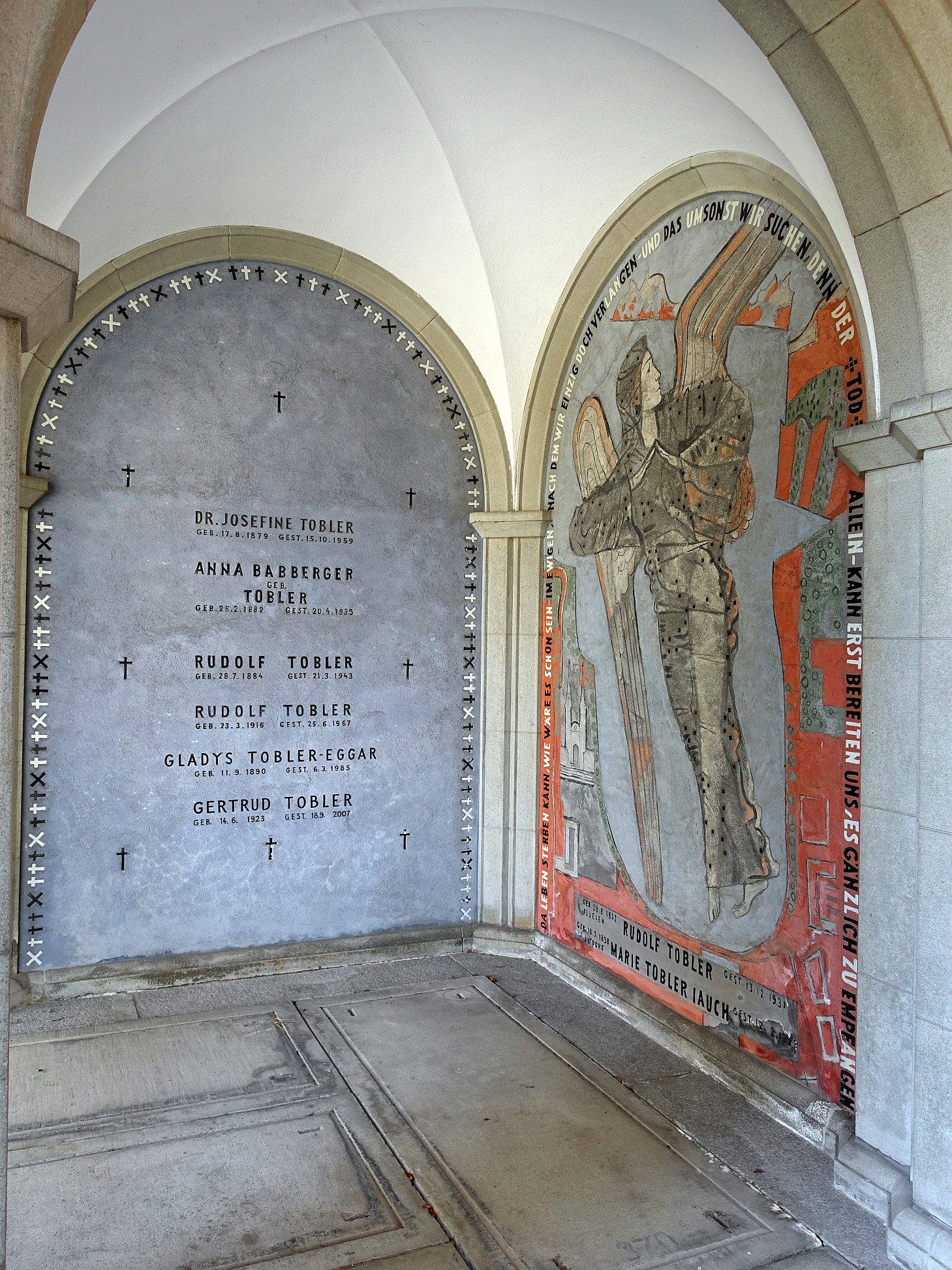 Anna Maria Babberger-Tobler (1882–1935) Malerin, Dichterin, und Textilgestalterin. Feld 21, Familien Grab auf dem Friedhof Friedental, Stadt Luzern